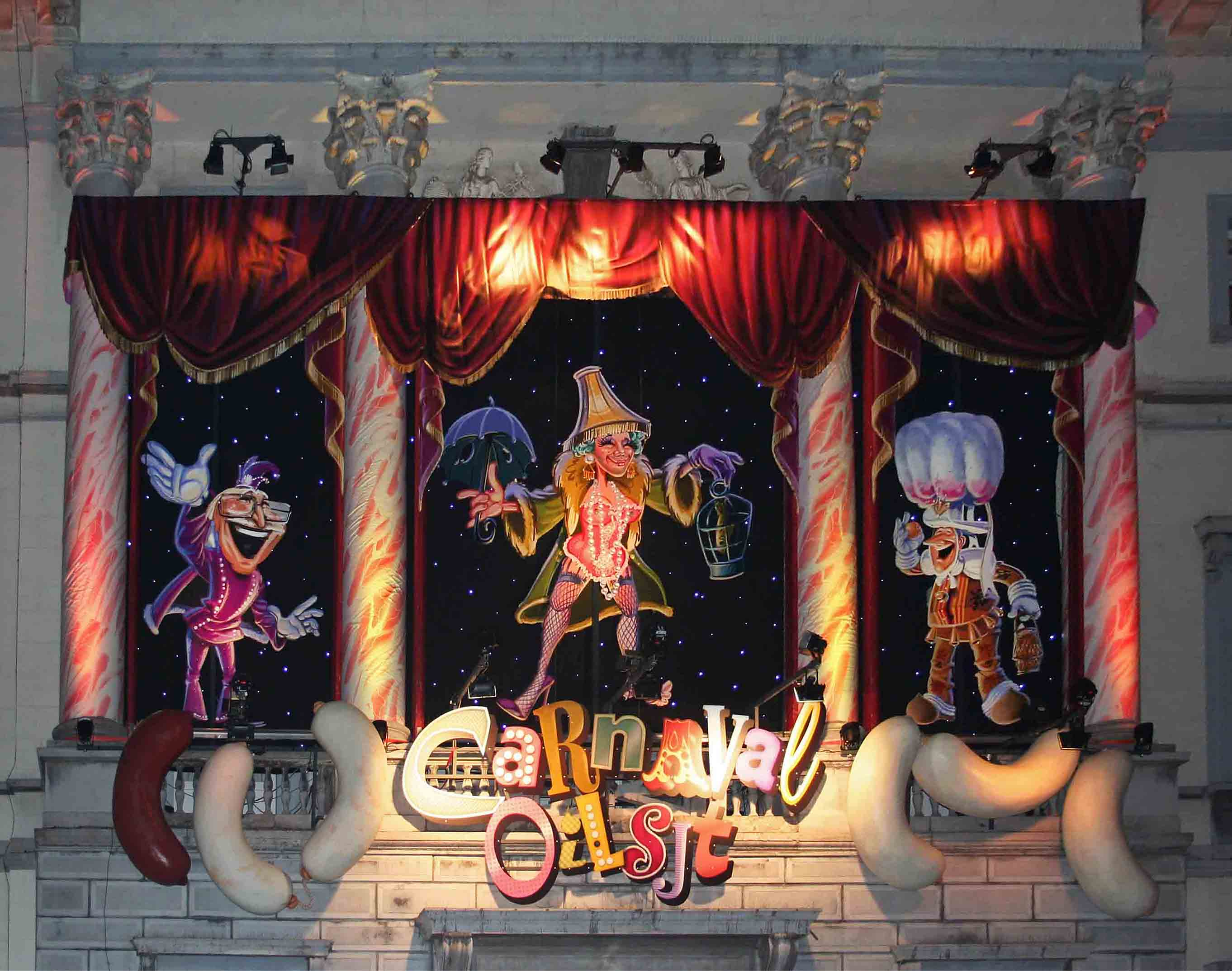 Het Aalsters Stadhuis tijdens Carnaval.